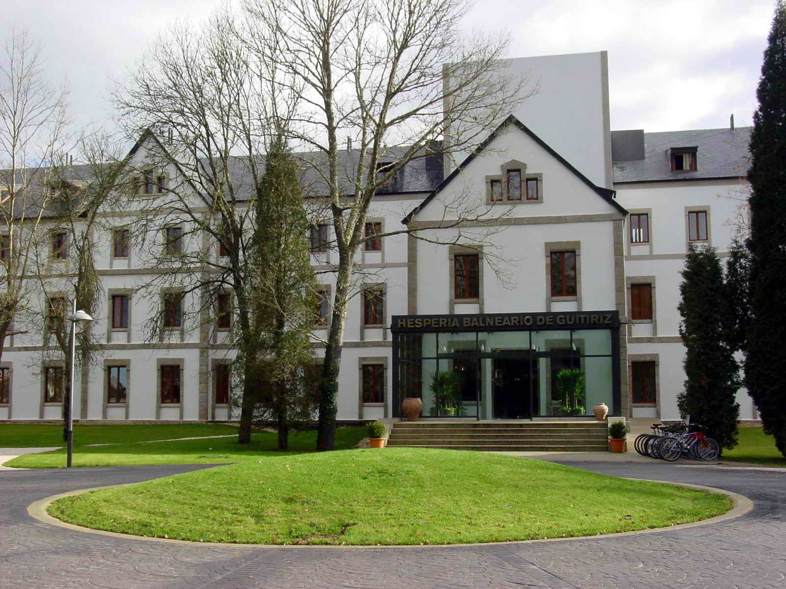 Balneario de Guitiriz. Foto tirada cunha Nikon E8800